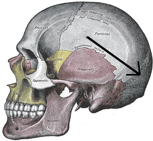 módosítottam a képet